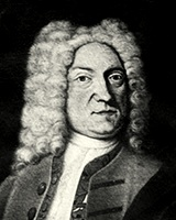 Porträt von Daniel Nebel (um 1558-1626), Rechtswissenschaftler und Rektor der Universität Heidelberg